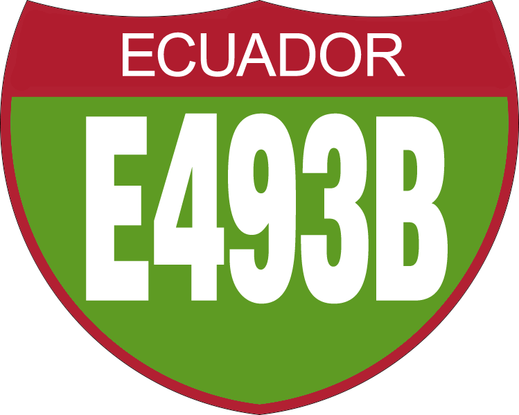 Disco de Identificación Ruta E493B